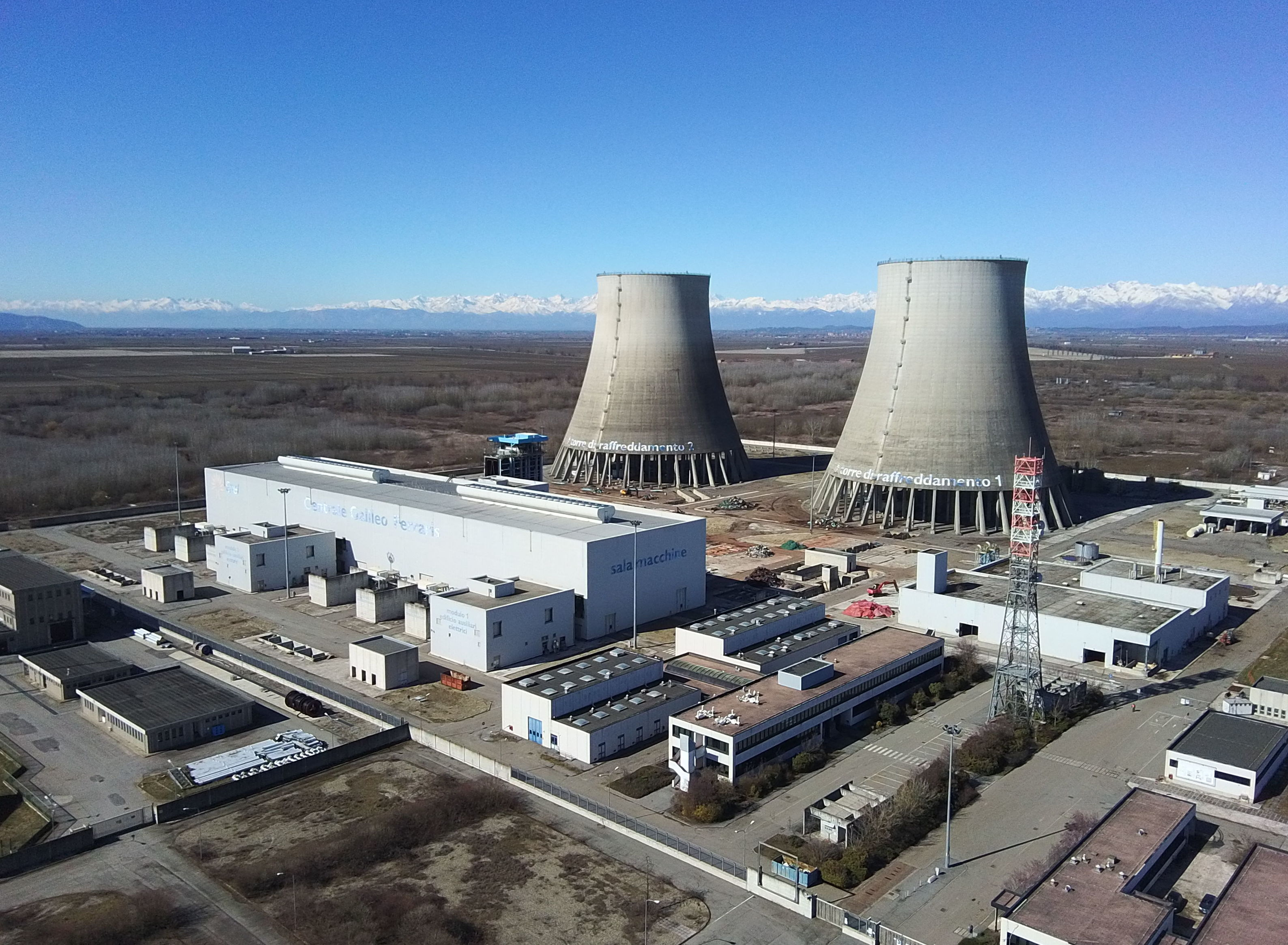 Centrale Galileo Ferraris,vista aerea di insieme